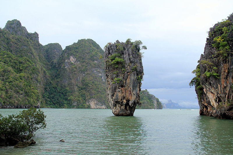 Phang Nga Körfezinde bulunan Ko Tapu. James Bond Adası olarak bilinir.